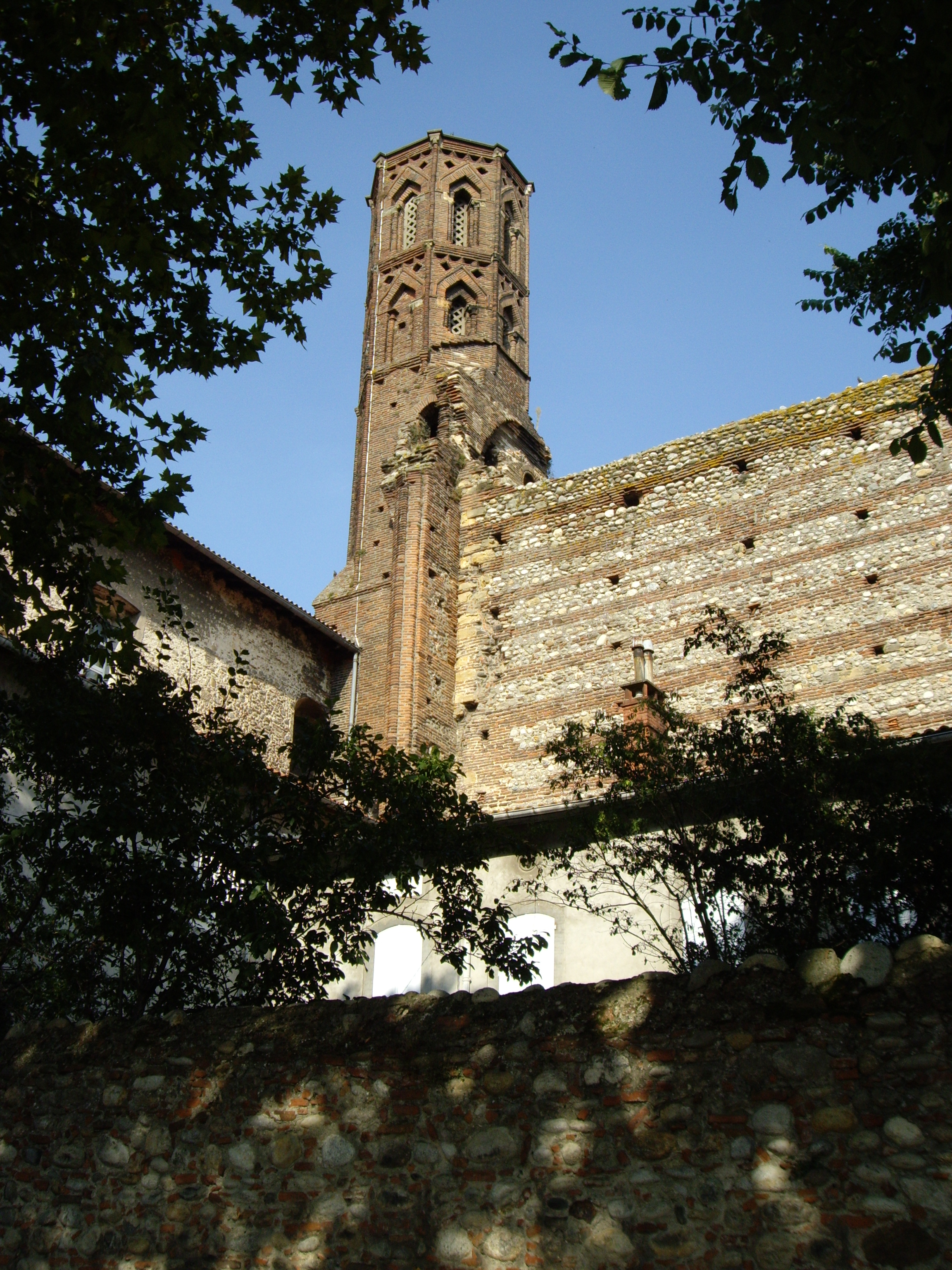 Tour des Cordeliers de Pamiers (09)